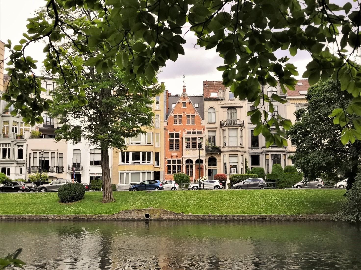 Vue sur l'avenue des Klauwaerts depuis les étangs d'Ixelles